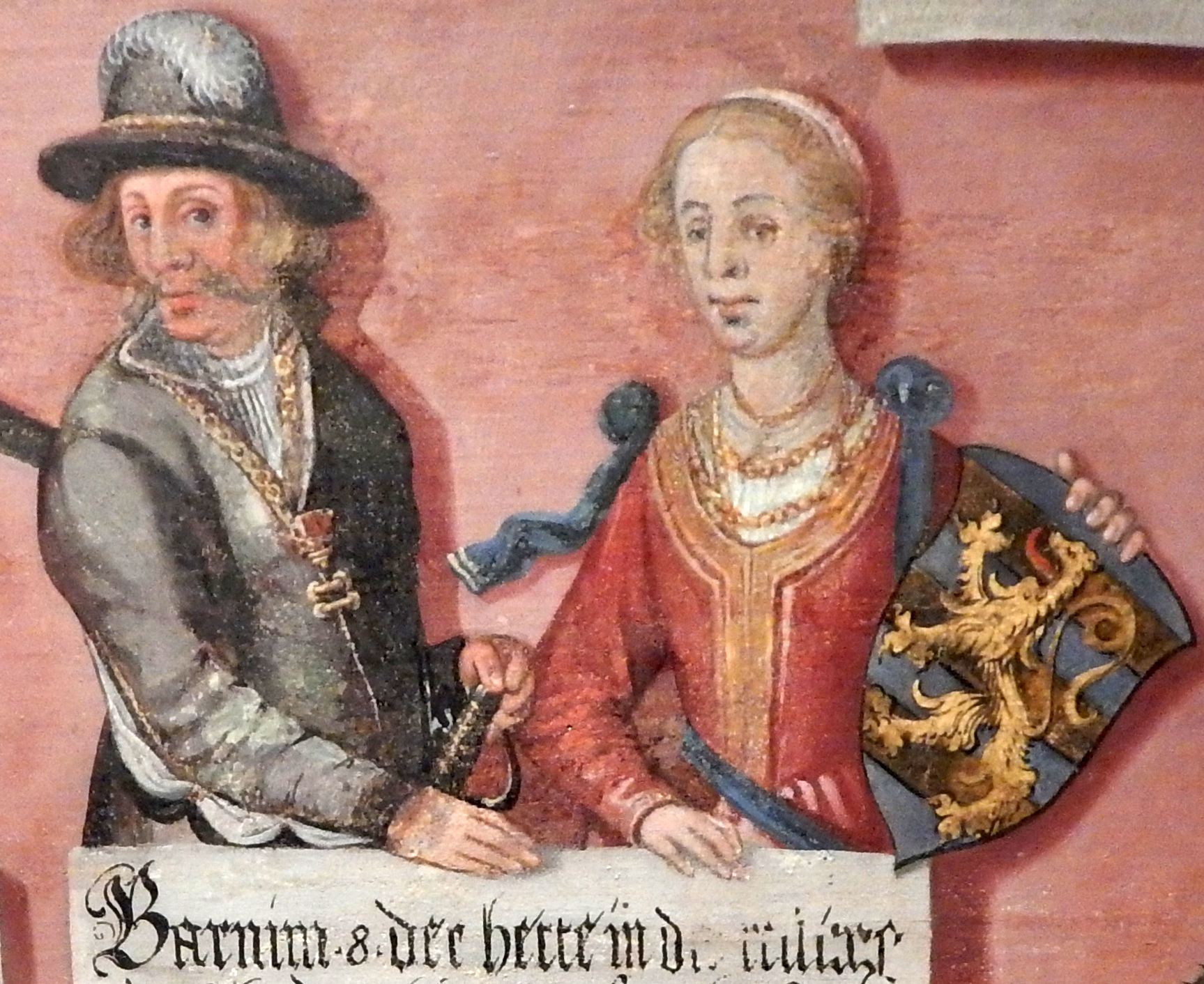 Barnim VIII. von Pommern mit seiner Gemahlin Anna von Wunstorf.